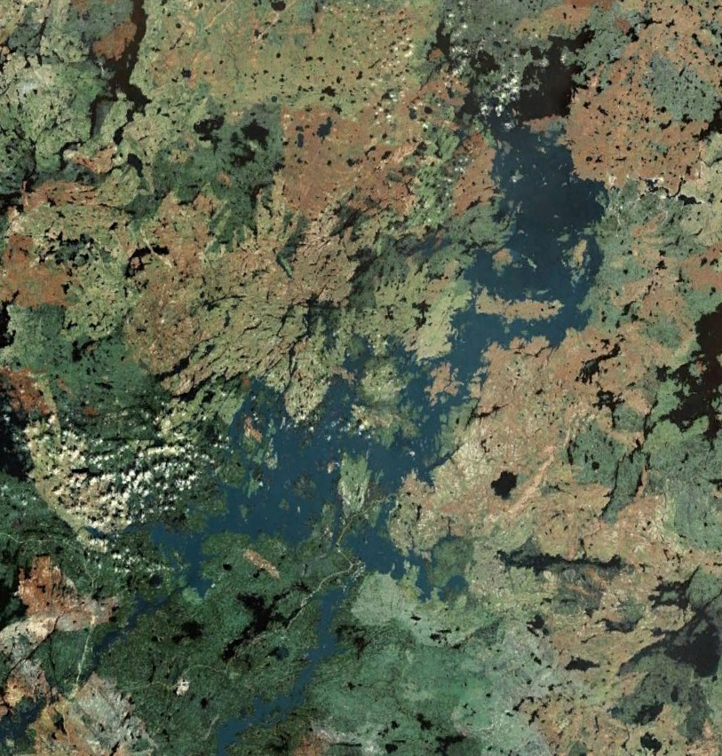 Lac Southern Indian, Manitoba, Canada